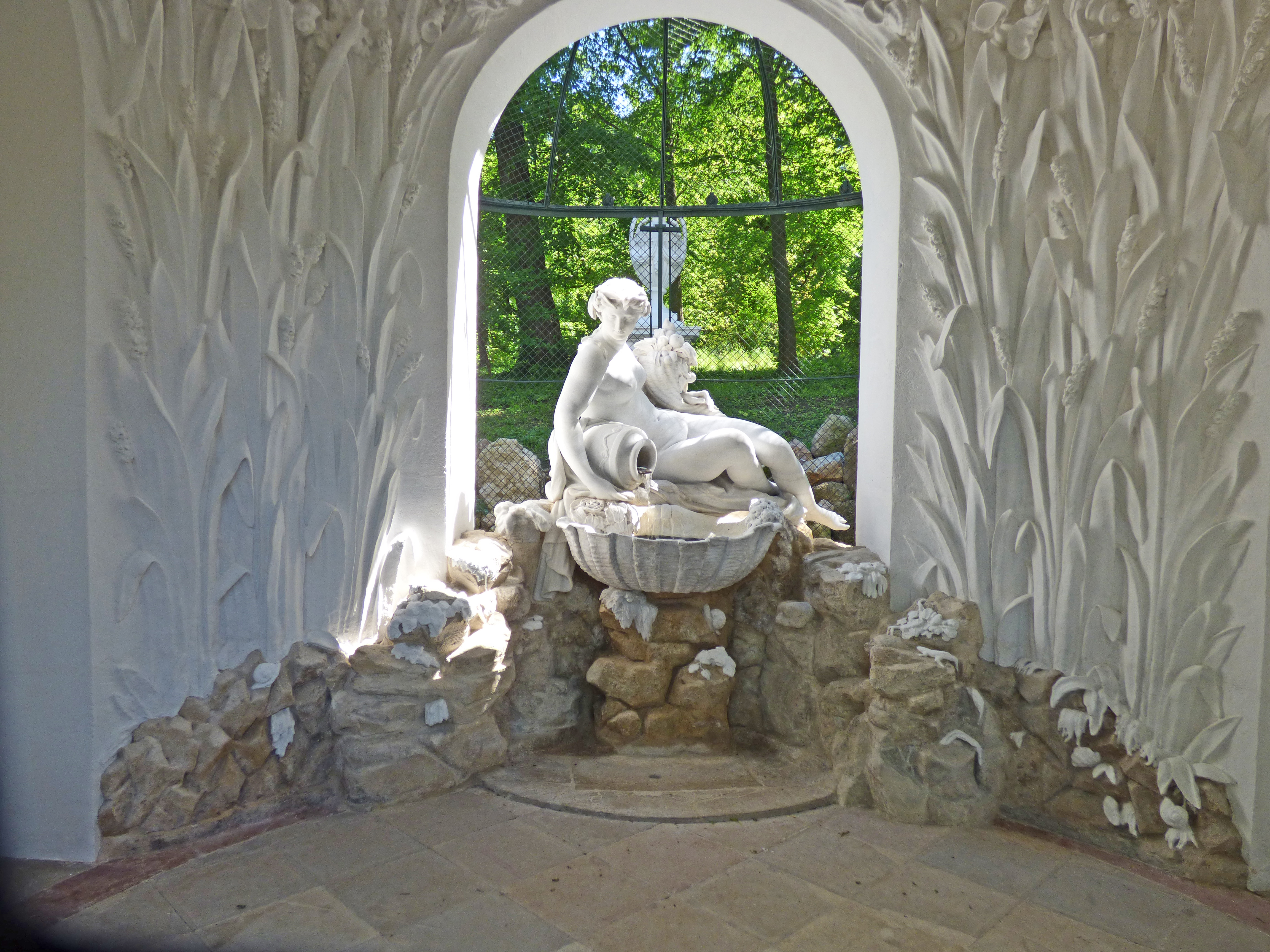 Schöner Brunnen, Schlosspark Schönbrunn.